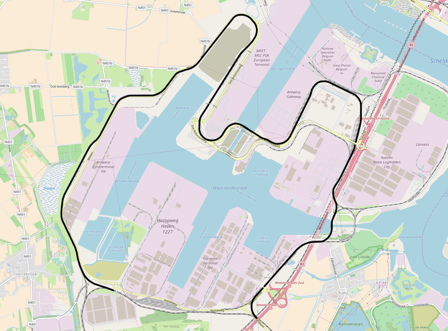 Belgian Railway Line 211, Y Steenland - Bundel Zuid